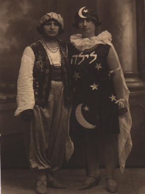 שושנה קליינר עם חברה בנשף פורים במועדון הציוני